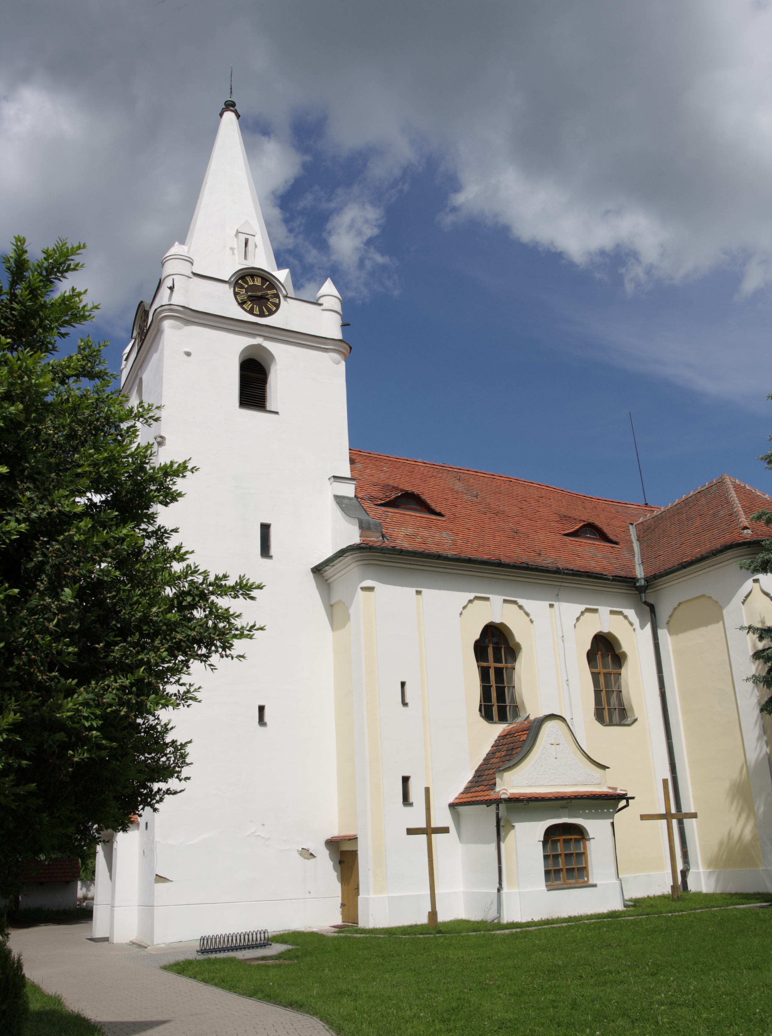 Telnice - kostel svatého Jana Křtitele.